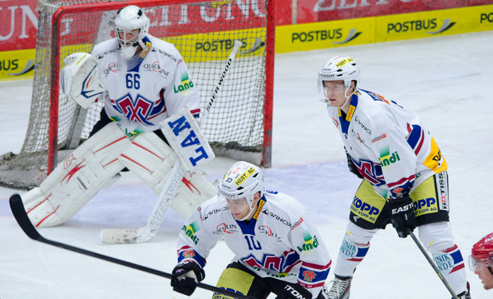 Düsseldorfer EG VS. EHC Biel